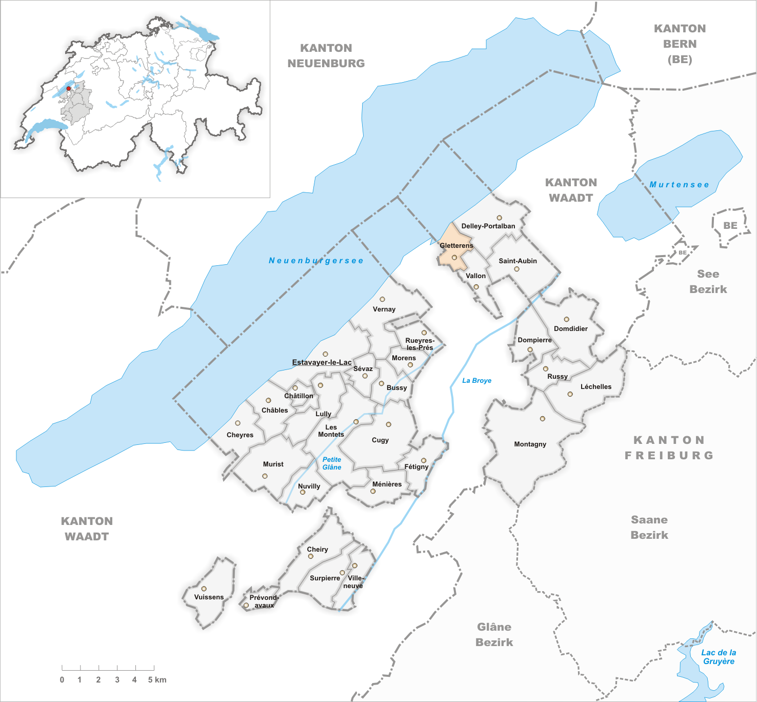 Municipality Gletterens